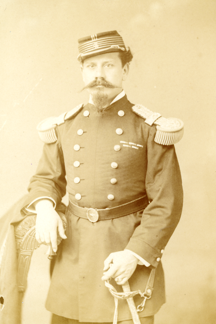 Marcial Pinto Aguero (Valparaíso, 17 de Marzo de 1851 - ibídem, 6 de Junio de 1905) Militar chileno, participó en la Guerra del Pacífico.